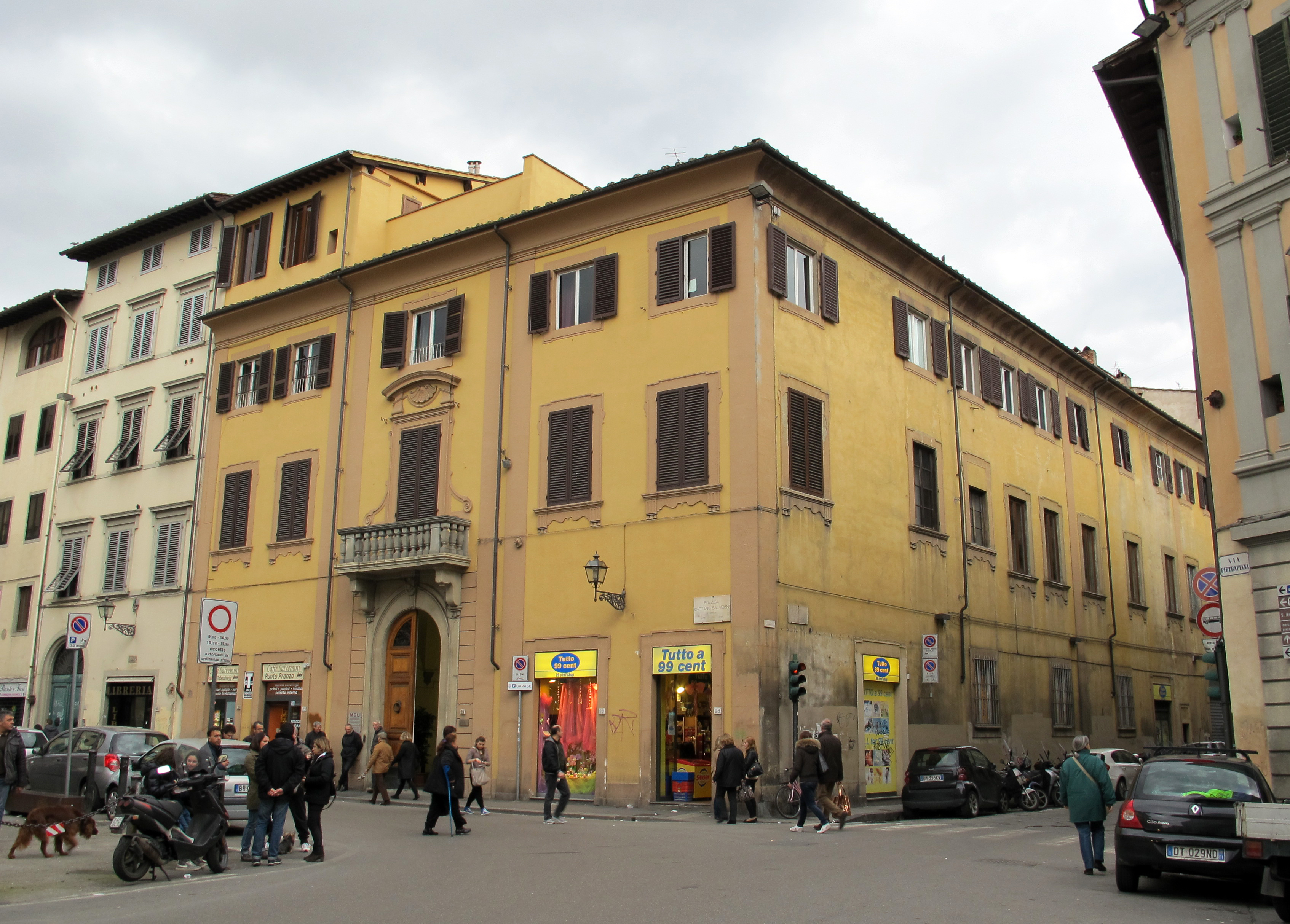 Piazza salvemini, palazzo bartolommei